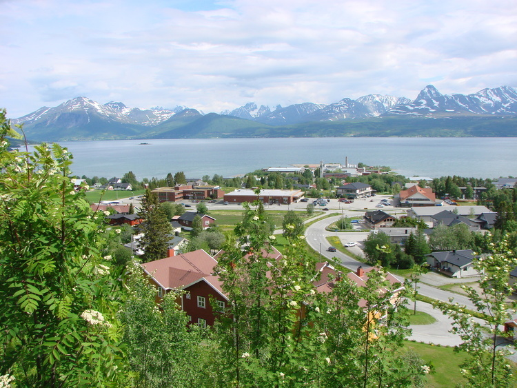 Storsteinnes